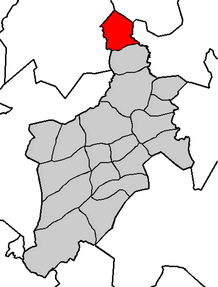 Situación da parroquia de Orto no concello de Abegondo